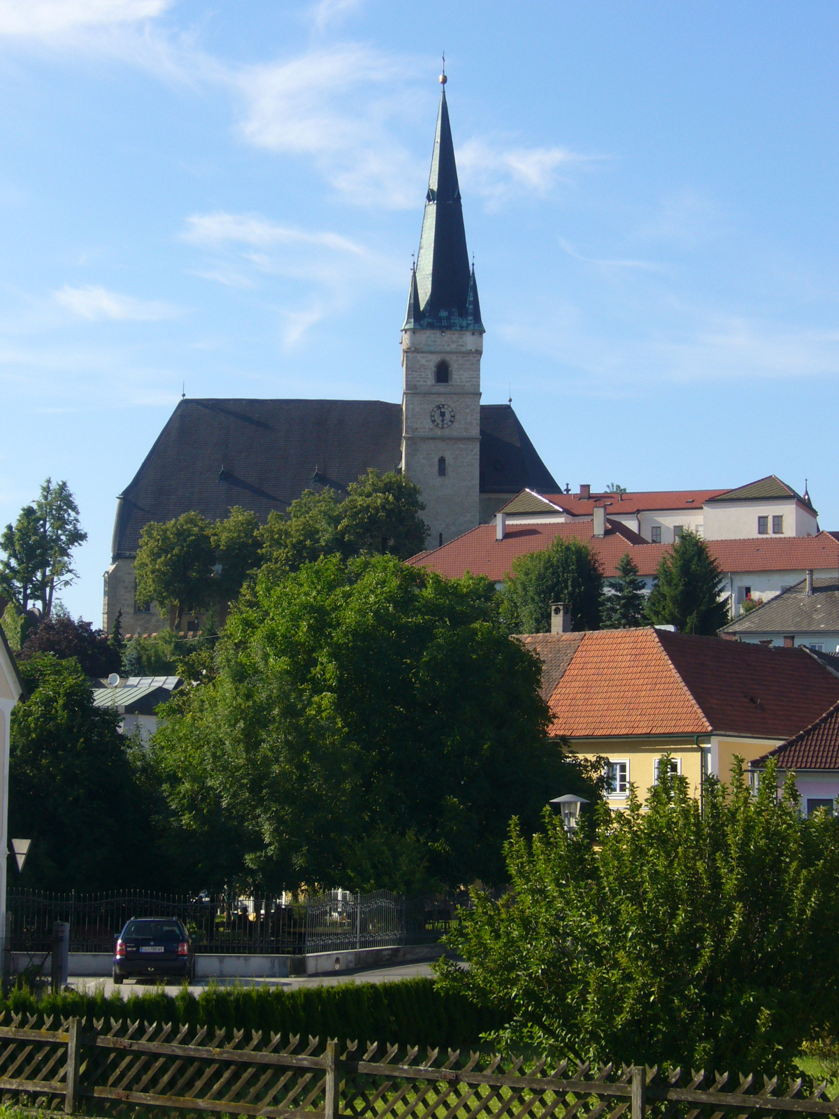 haag aussen